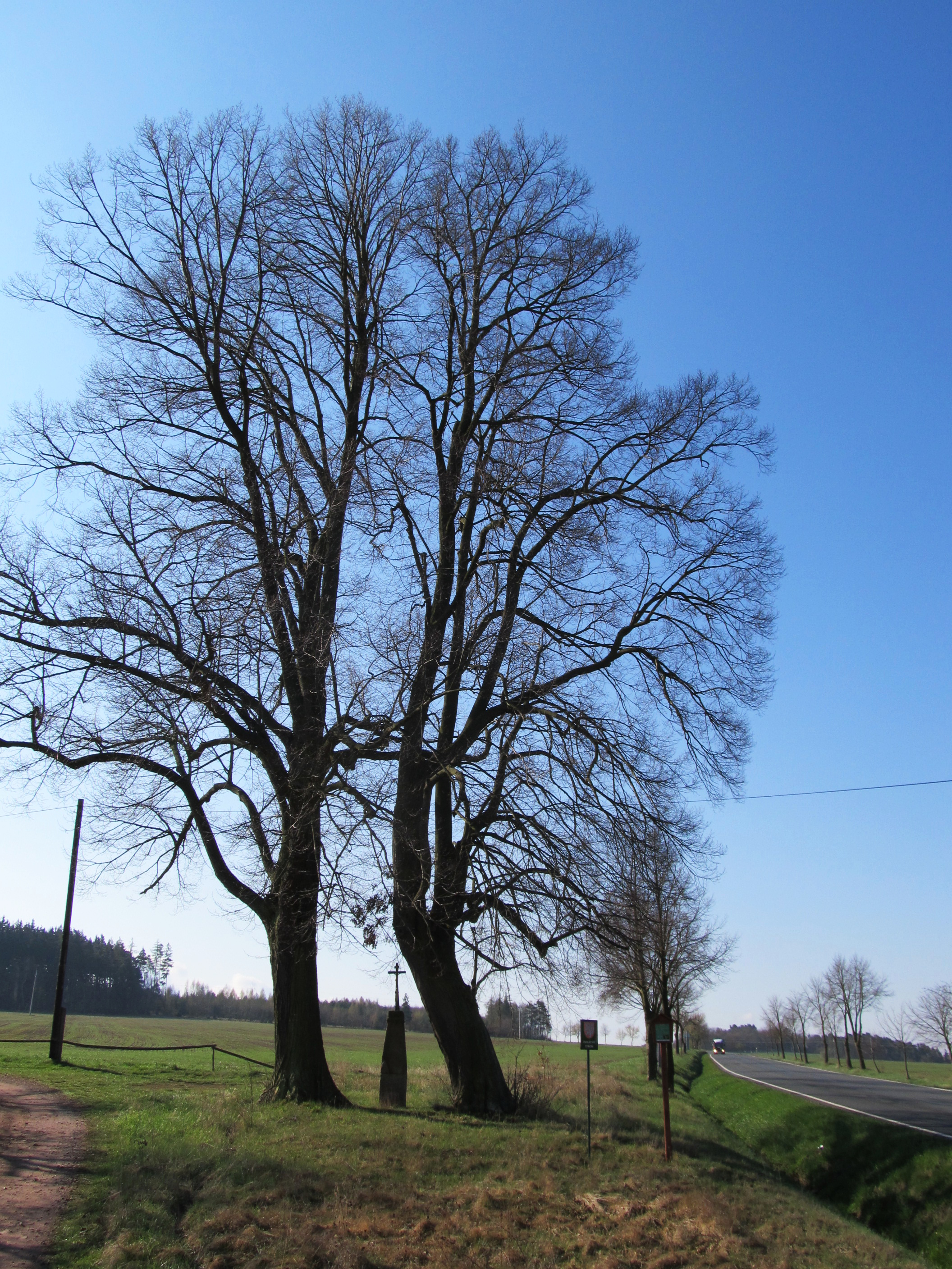 Mirošov - lípy U křížku